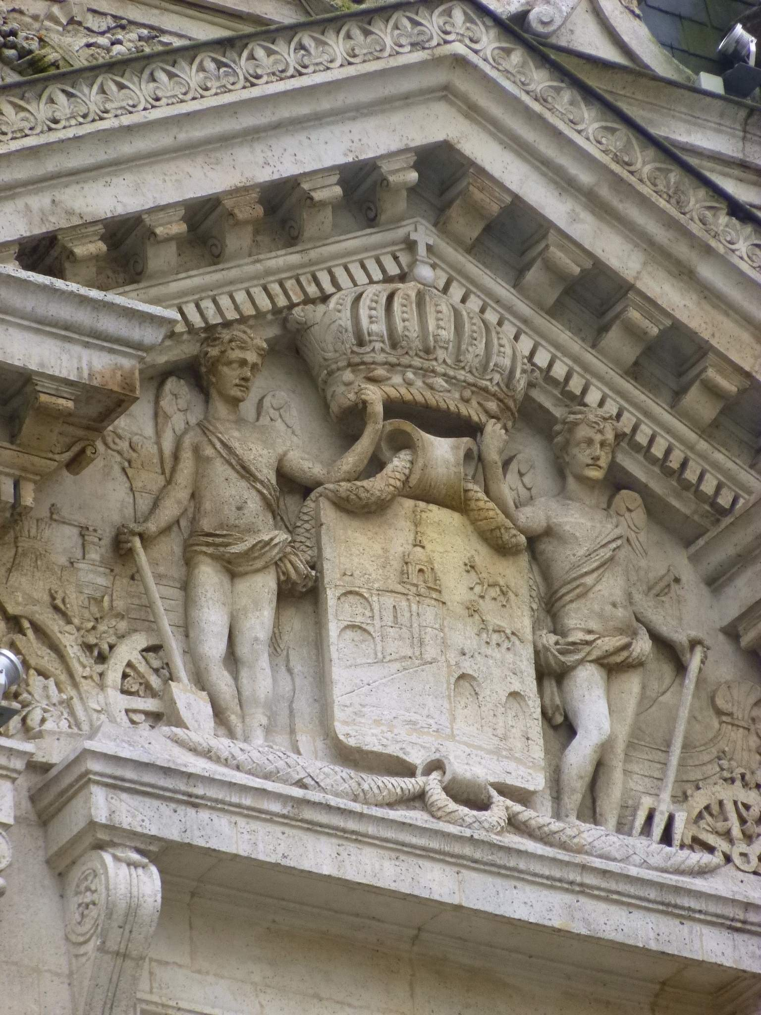 Primera sede en Bilbao del Banco de Bilbao